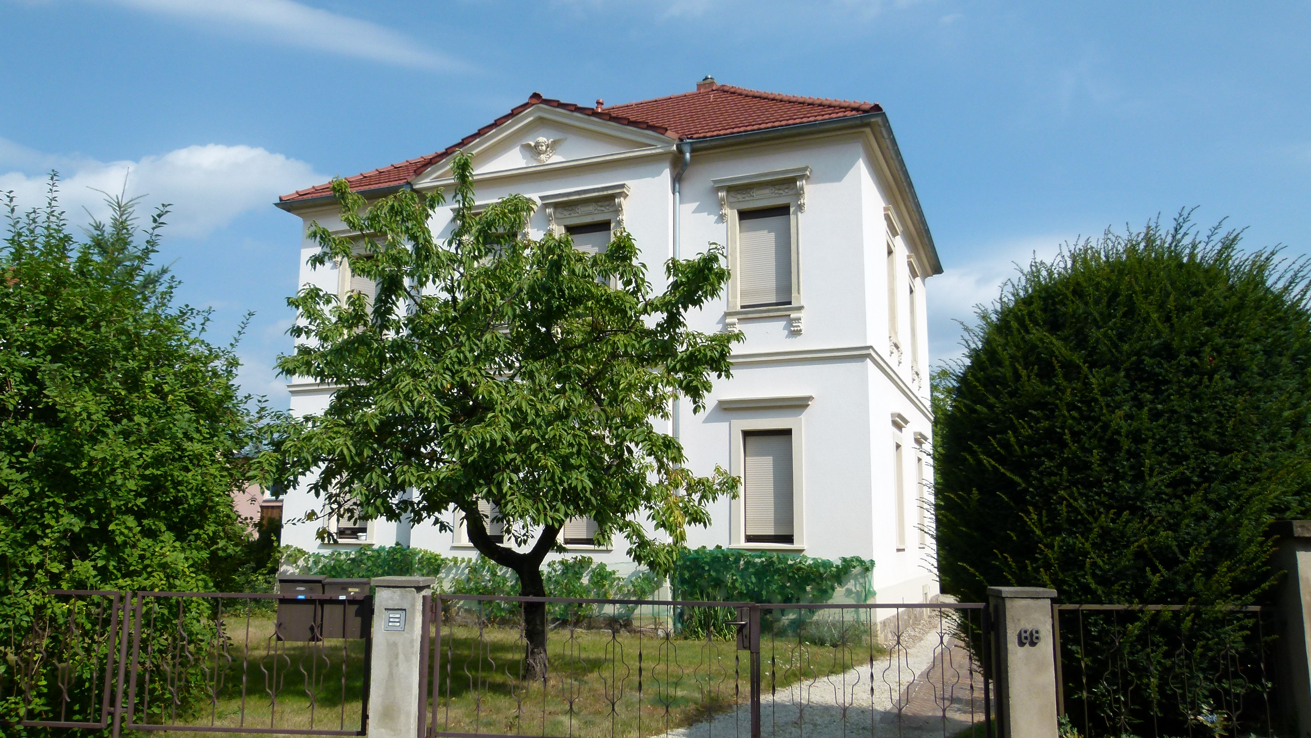 Denkmalgeschütztes Haus, Heinrich-Zille-Straße 68, Radebeul, Sachsen